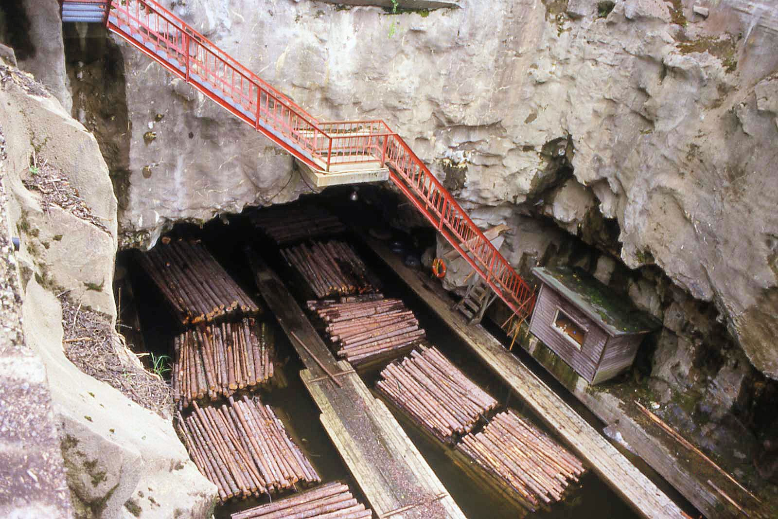 Kimolan kanava